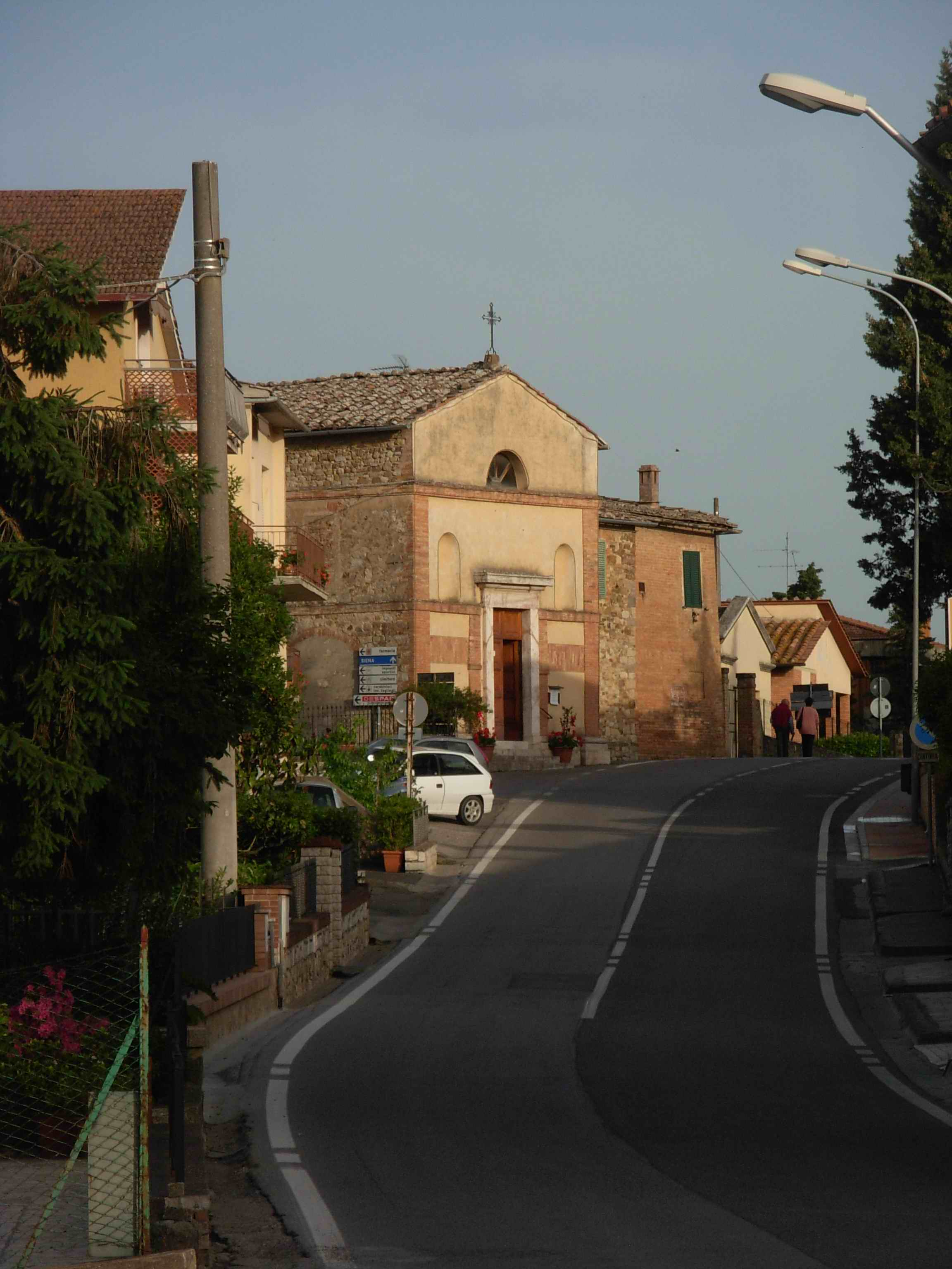 Quercegrossa (Castelnuovo Berardenga - Siena -Italia)